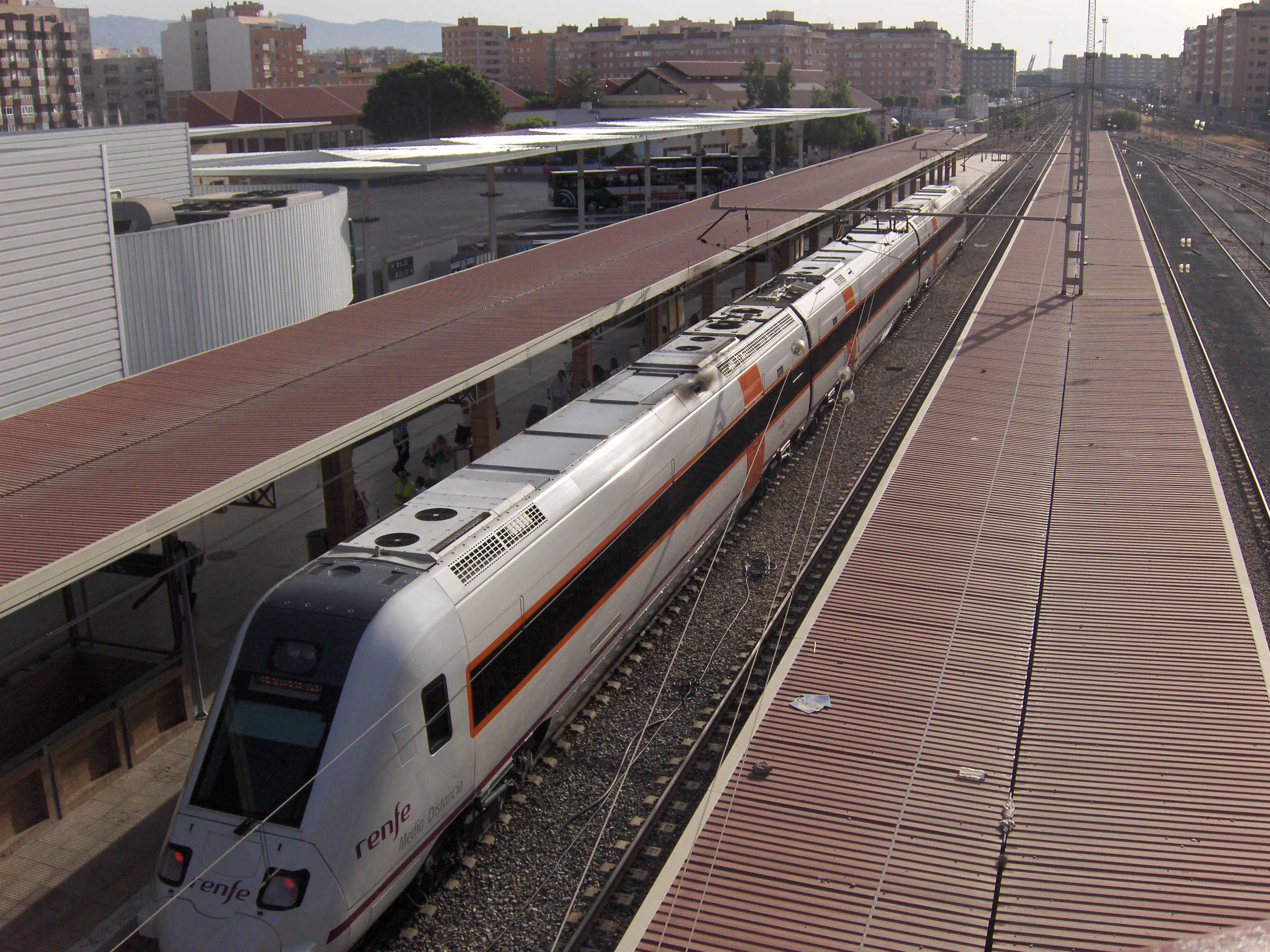 Tren recién llegado a Almería desde Sevilla